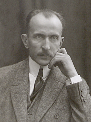 Johannes Letzmann, baltisaksa meteoroloog